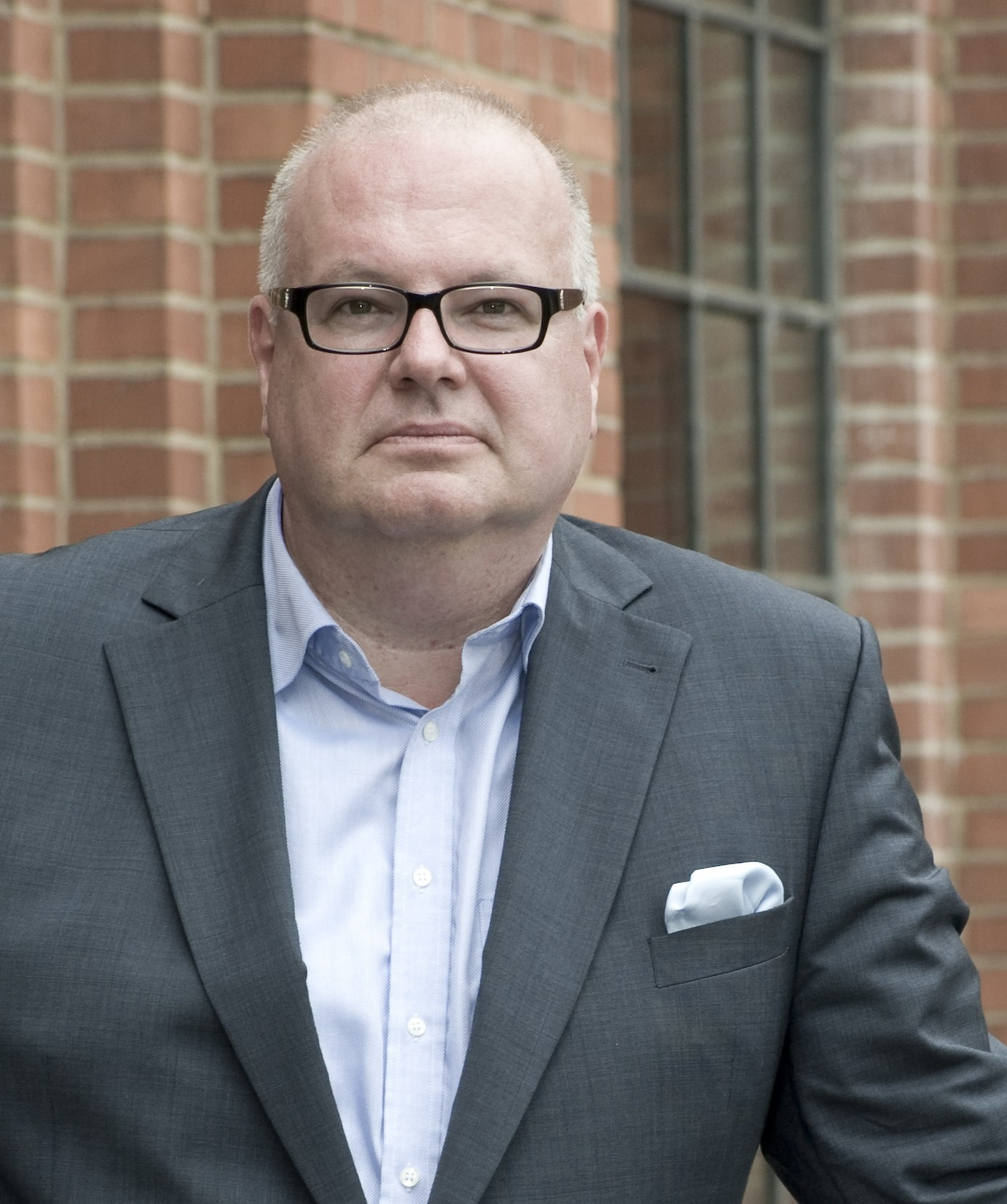 Roland Jäger ist Unternehmensberater, Coach und Buchautor